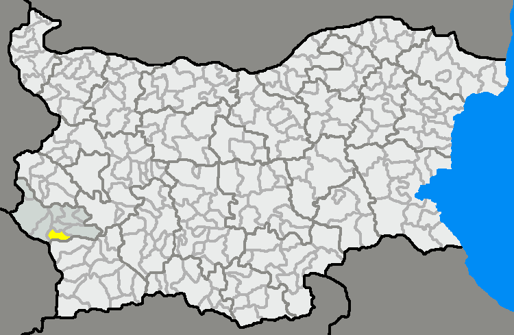 Община Кочериново на картата на област Кюстендил, България